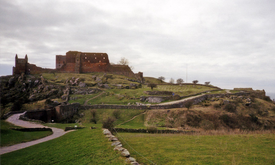 Ruine der Burg Hammershus auf Bornholm originally uploaded on de.wikipedia by Benutzer:Darkone at 23:46, 7. Nov 2004. Filename was Burg Hammershus 1.jpg.